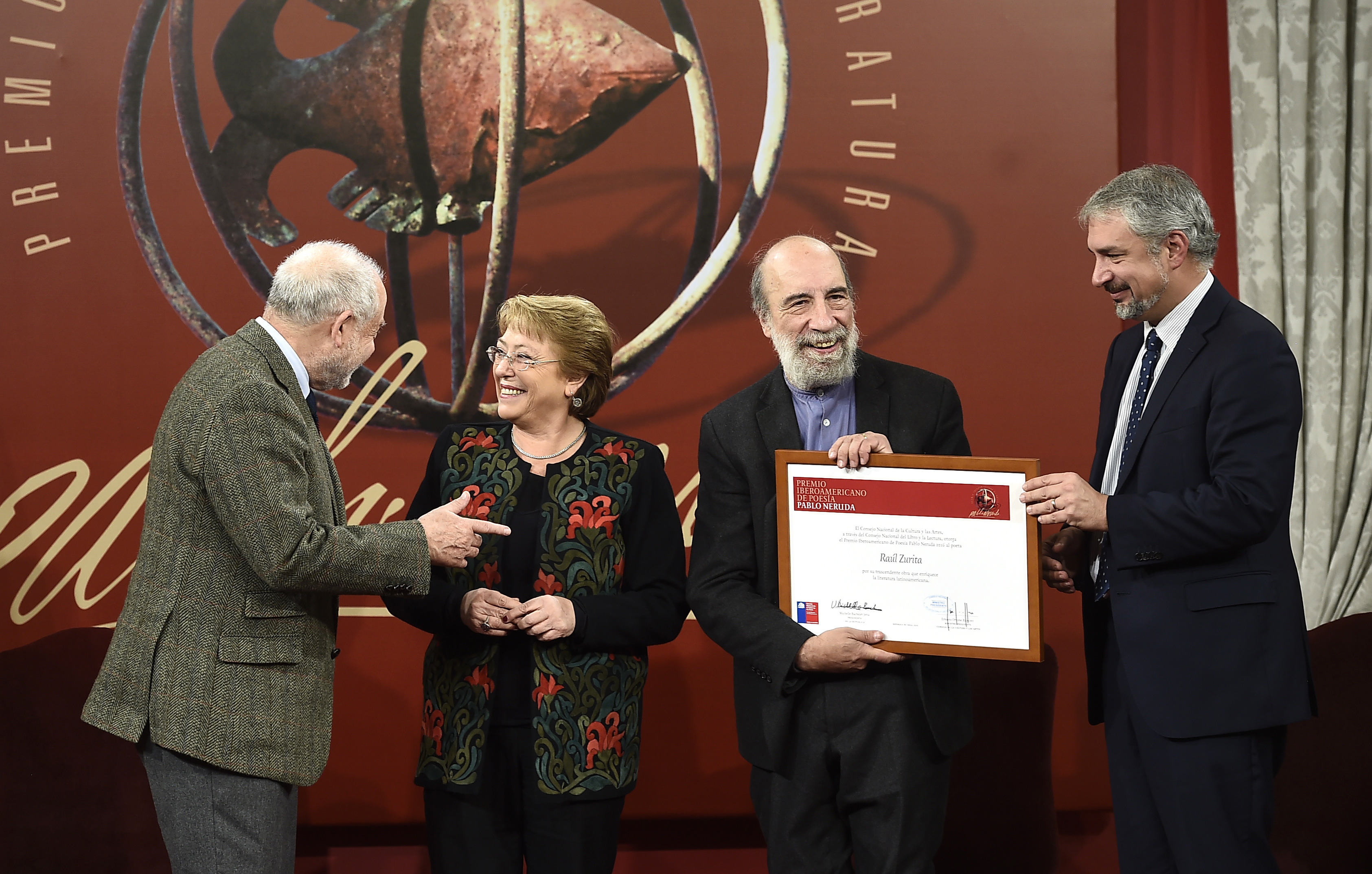 Raúl Zurita recibe "Premio Iberoamericano de Poesía Pablo Neruda" en manos de la presidenta de Chile Michelle Bachelet y el ministro presidente del Consejo Nacional de la Cultura y las Artes, Ernesto Ottone.